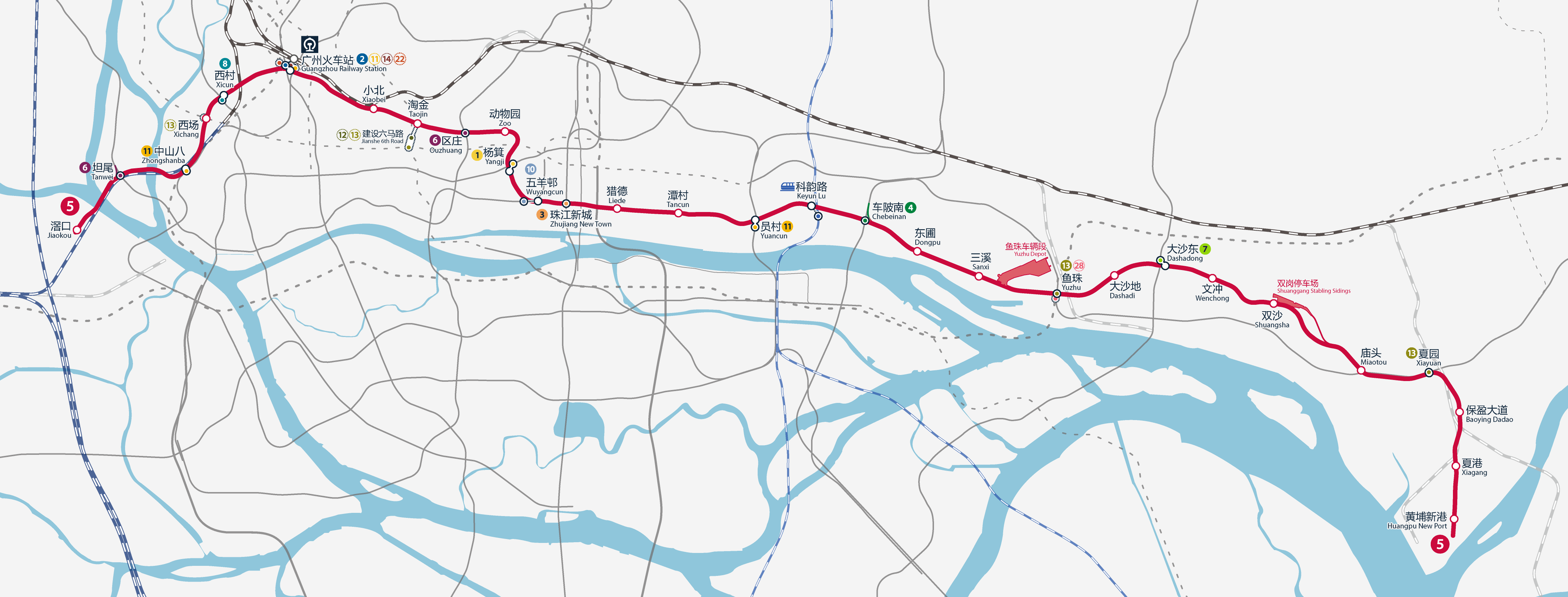 廣州地鐵5號線路線圖，按真實走向比例繪畫